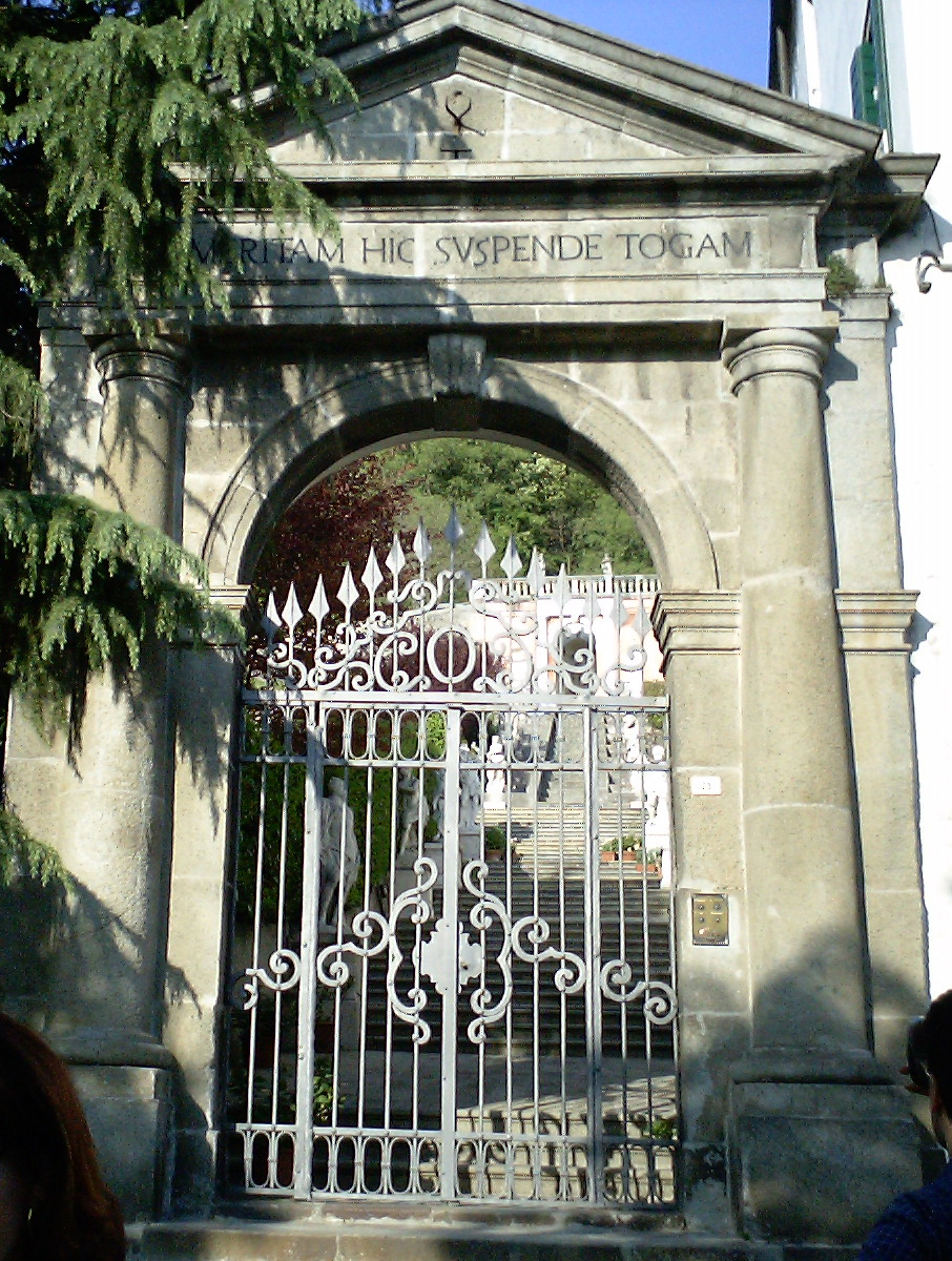 Ingresso di Cà Nani Mocenigo a Monselice, foto scattata da Roberto Fogliardi il 22/04/2006